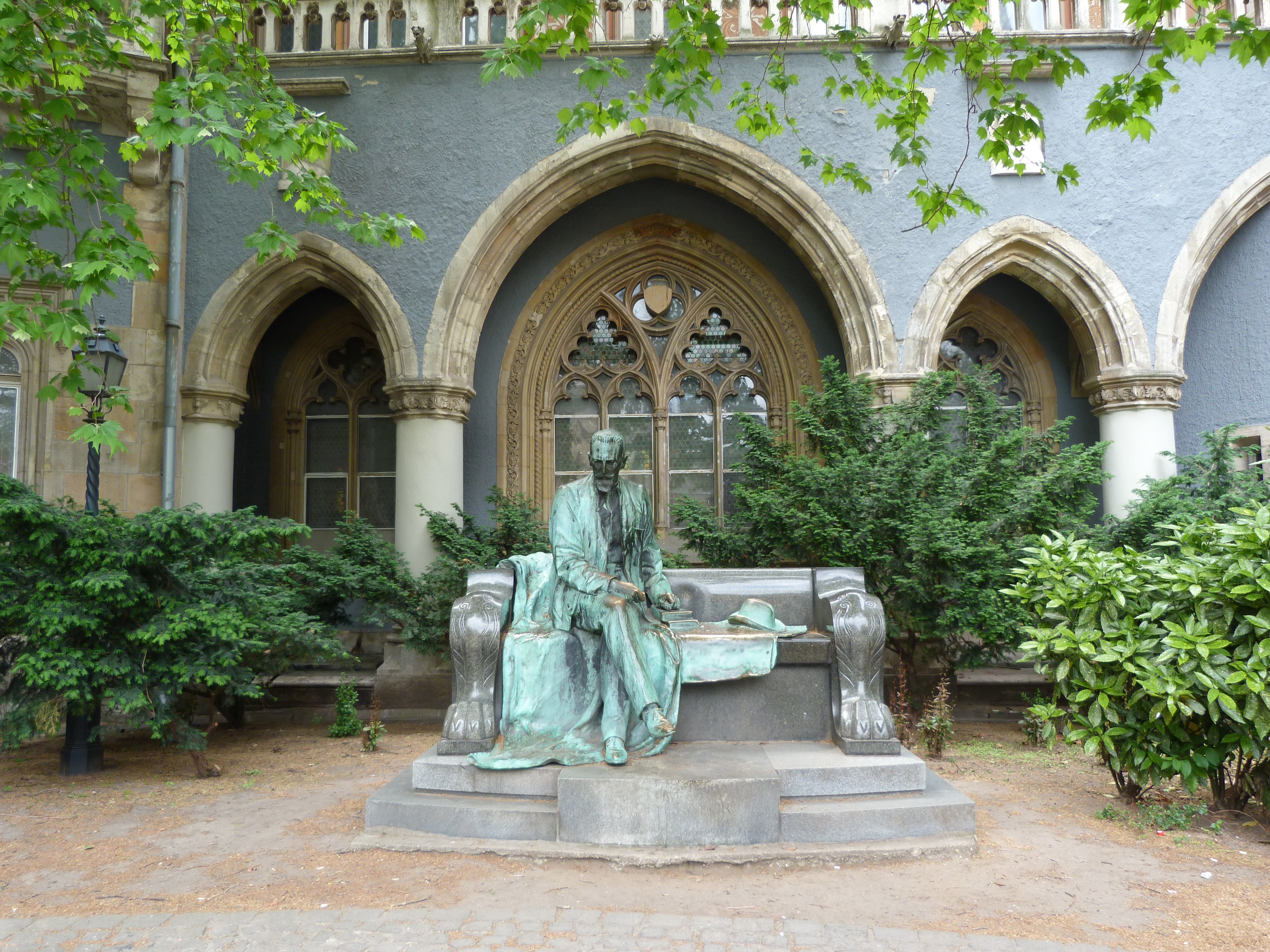 A felvétel 2012. május 19 -én készült Budapesten, a Városligetben, , a Vajdahunyad vár udvarán. Gróf Károlyi Sándor. Stróbl Alajos műve. ©© Derzsi Elekes Andor, Budapest, 2013, A kép és filmfelvételek egészben, vagy részletekben másolását, bármilyen úton történő sokszorosítását és felhasználását a szerző ellenérték nélkül, jogutódjaira is kihatóan megengedi. Az engedély kiterjed a kereskedelmi célú hasznosításra is. Kéri azonban nevének feltüntetését a felhasználás során. A Metapolisz sorozat valamennyi képe és filmje Creative Commons alatti valamint kereskedelmi - for profit - célra is felhasználható. Ajánlott hivatkozás: Derzsi Elekes Andor: Metapolisz DVD line